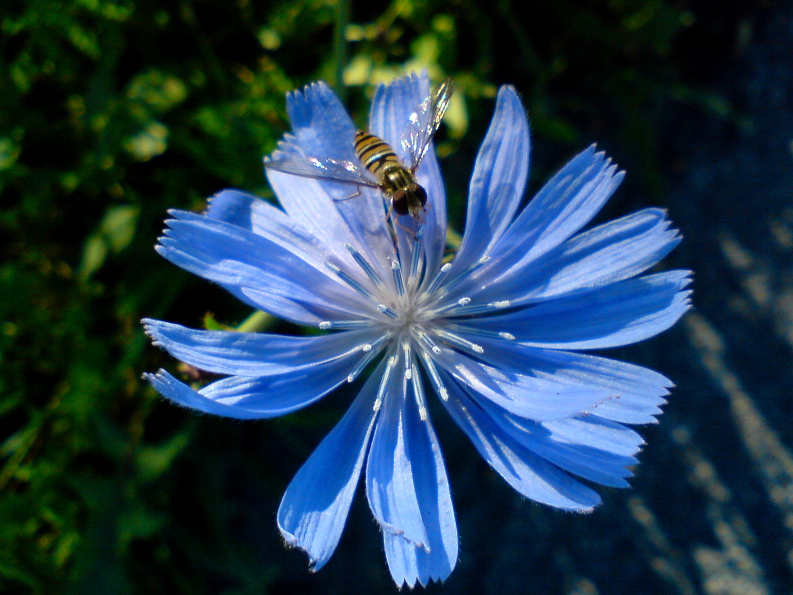 Śniadanie osy